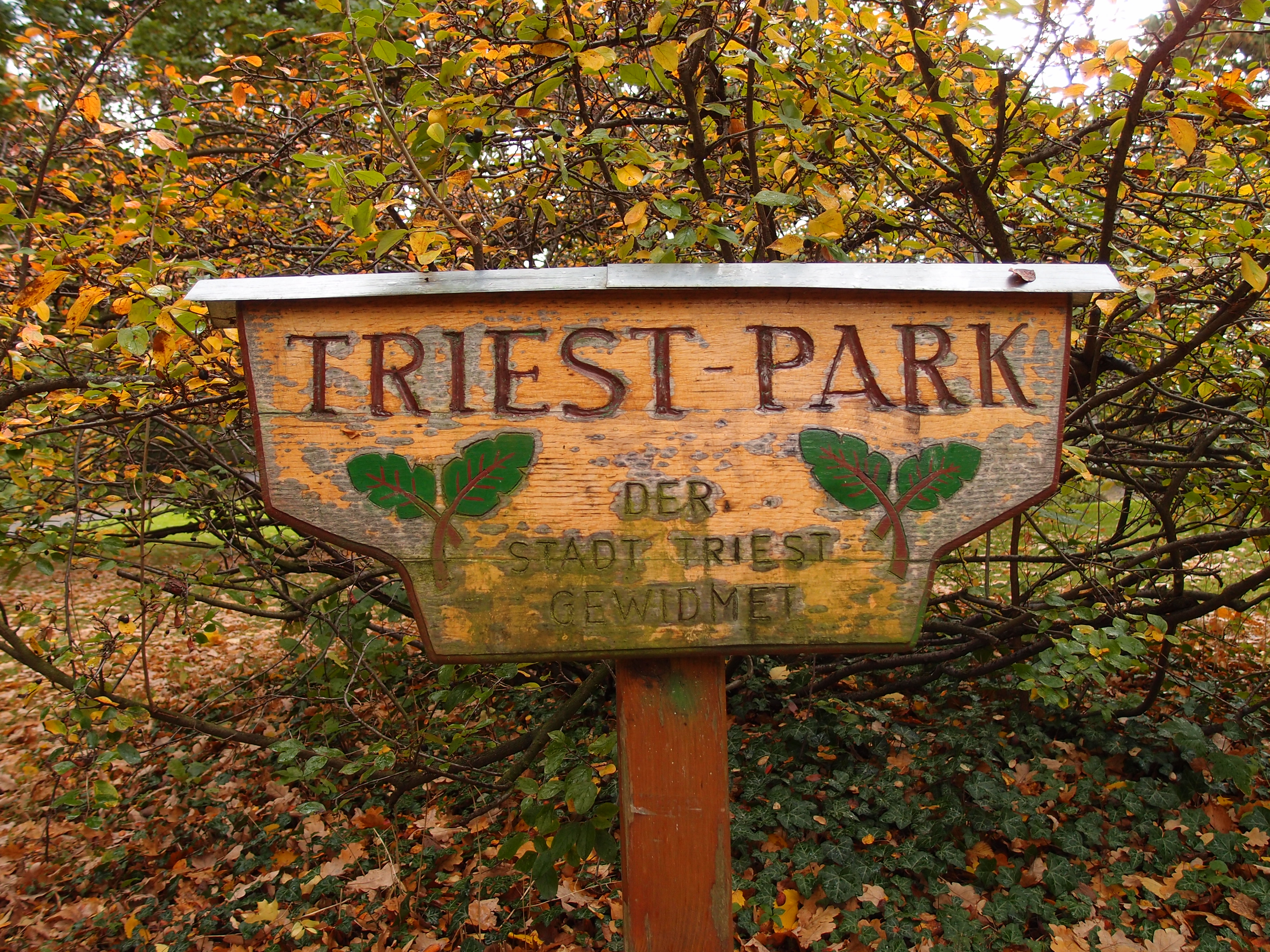 Triest-Park in Berlin